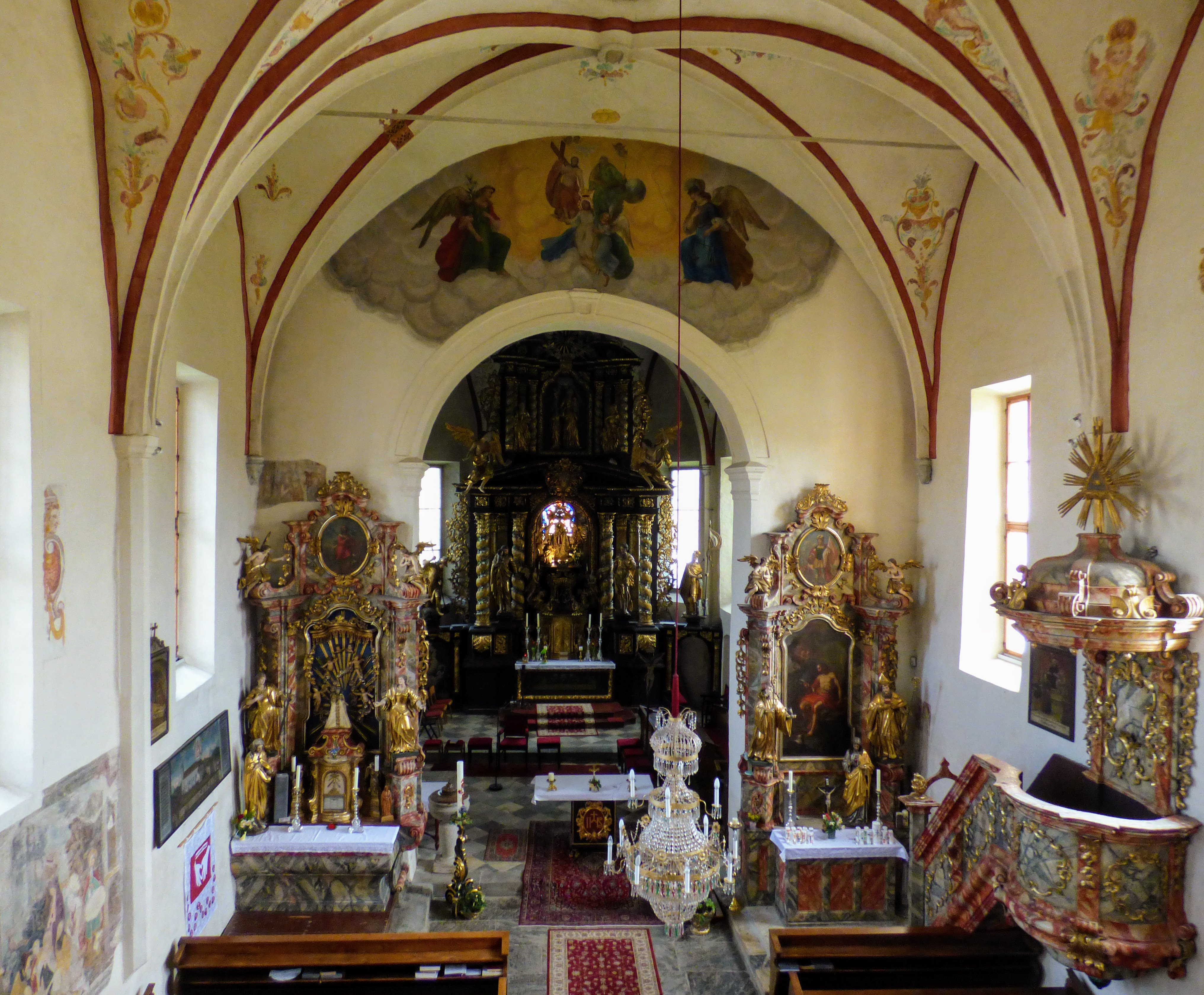 Kirche Maria Rojach, Kärnten